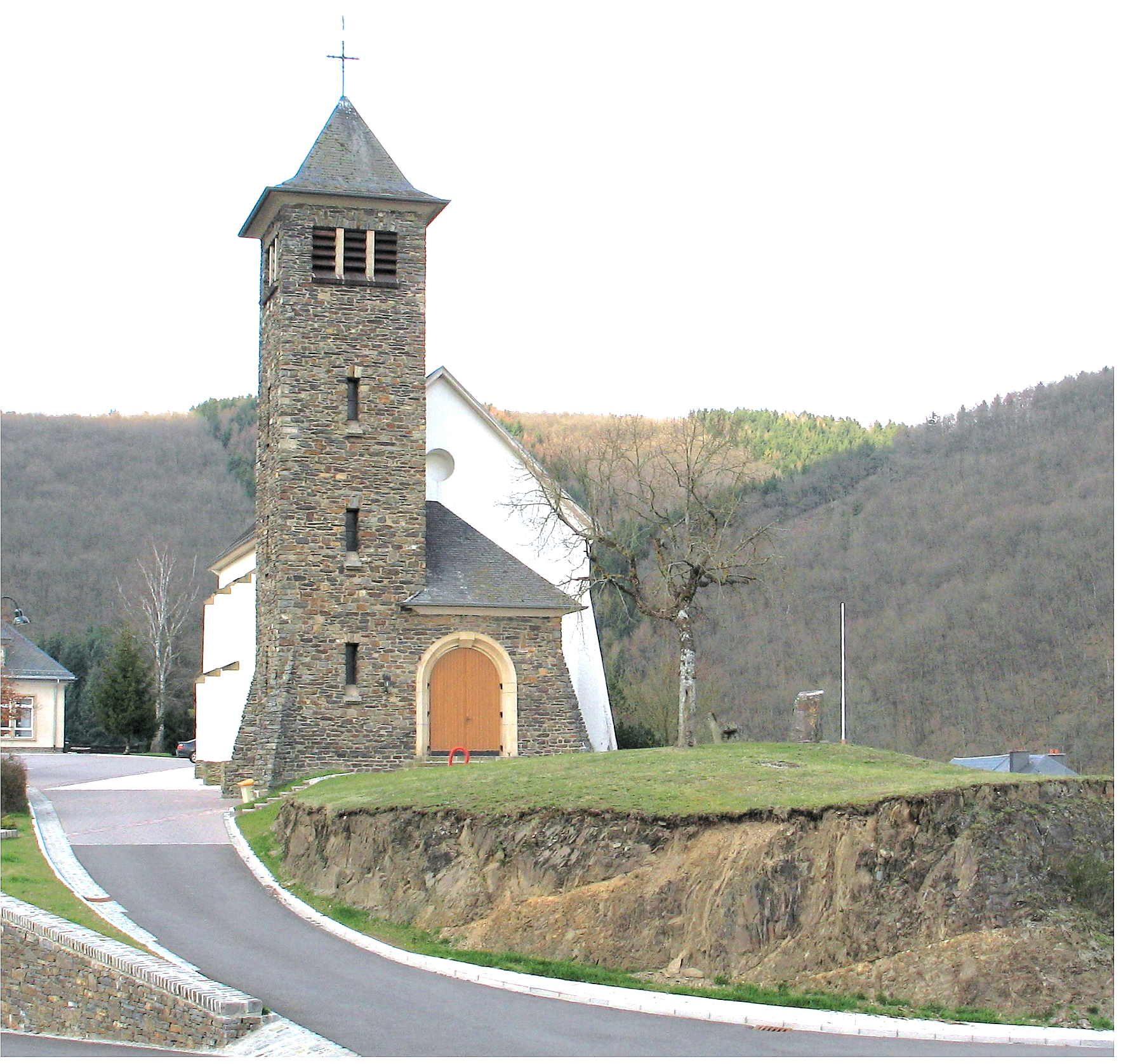 Sujet : Kierch Draufelt Source : Eege Foto Johnny Chicago (AbrÃ«ll 2006) Lizenz